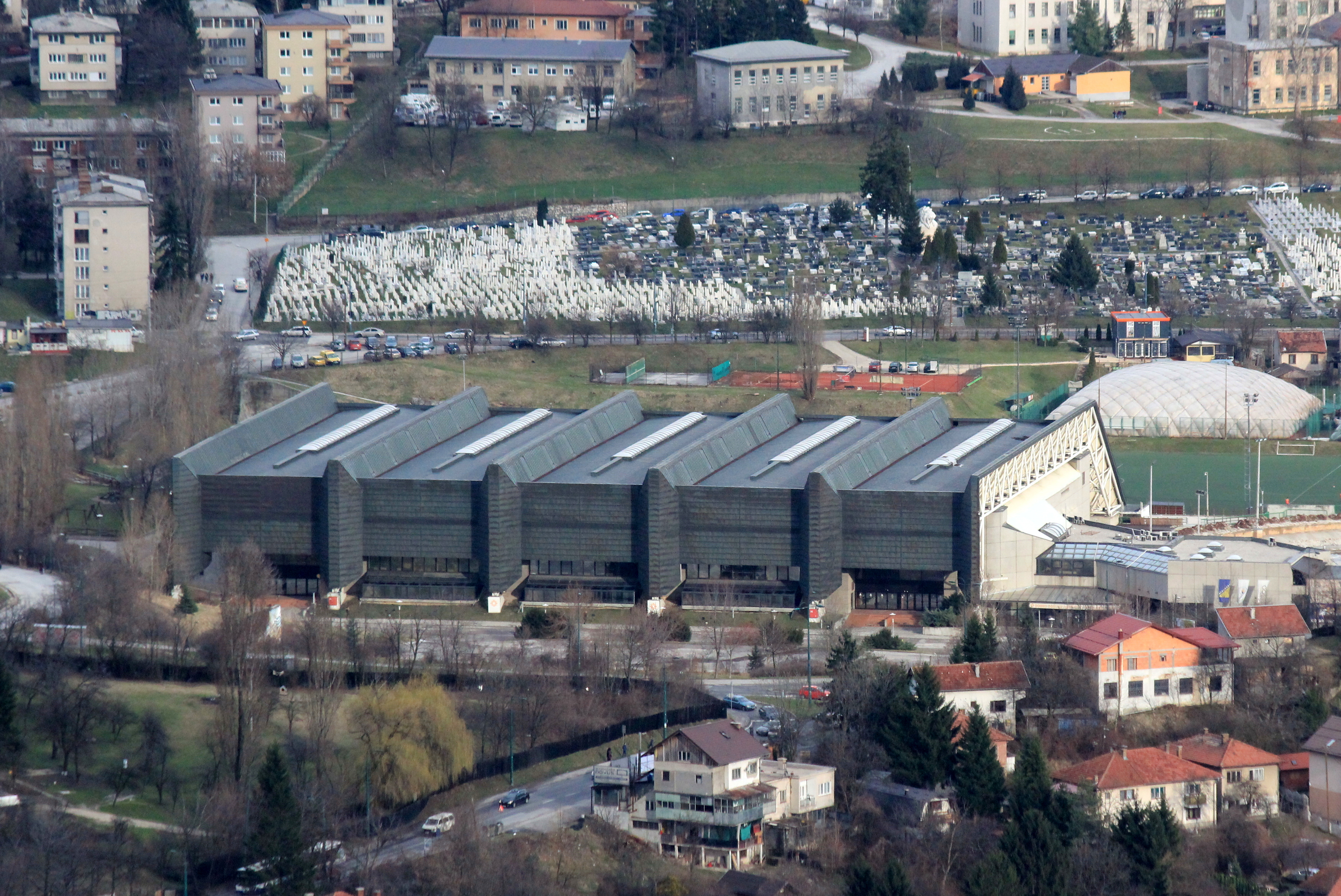 Blick vom Berg Hum auf Sarajevo.